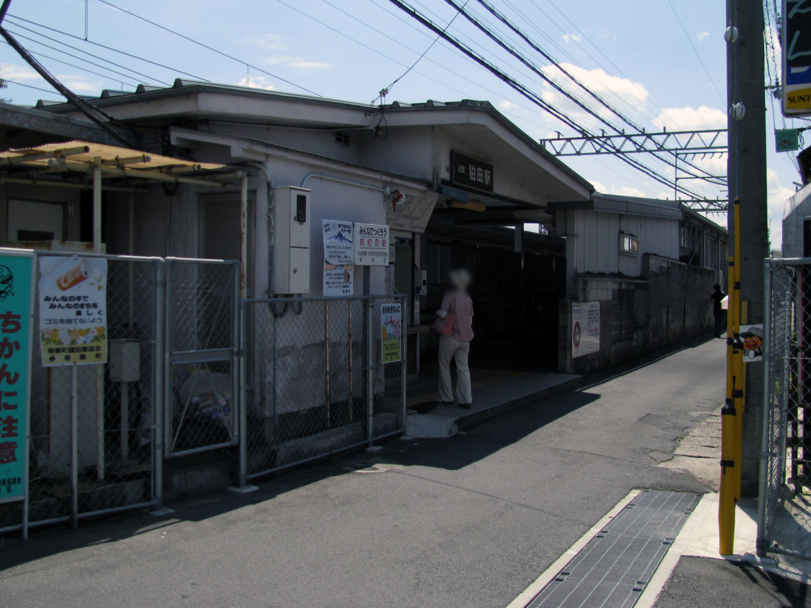 近鉄狛田駅